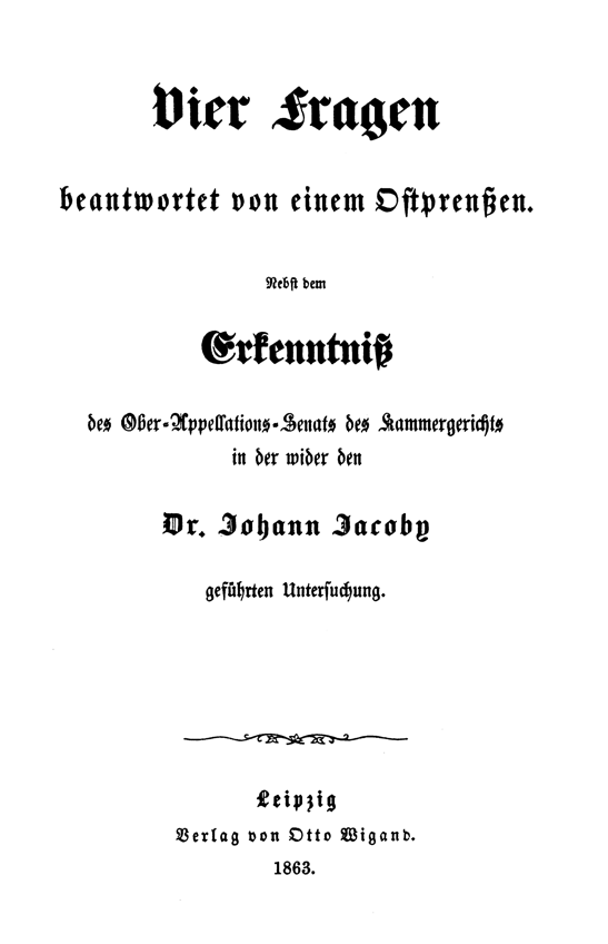 Titelblatt der 1841 erstveröffentlichten Schrift Vier Fragen, beantwortet von einem Ostpreußen. von Johann Jacoby (1863 Neuauflage).